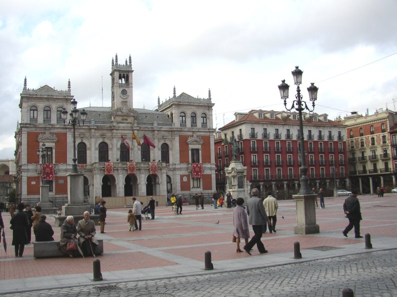 Ayuntamiento de Valladolid. Fotografía realizada el 20 de abril de 2003 por el autor. User:Pelayo2